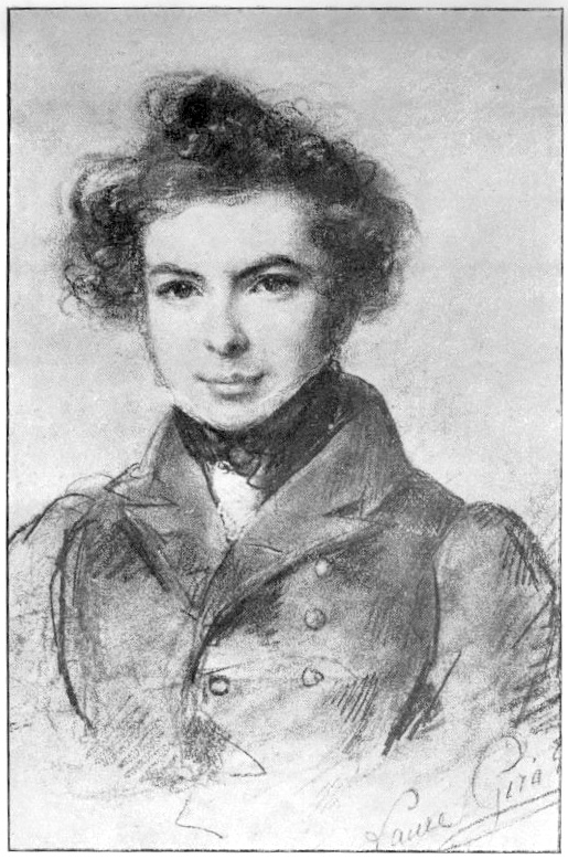 Paul Foucher (1810–1875), French dramatist